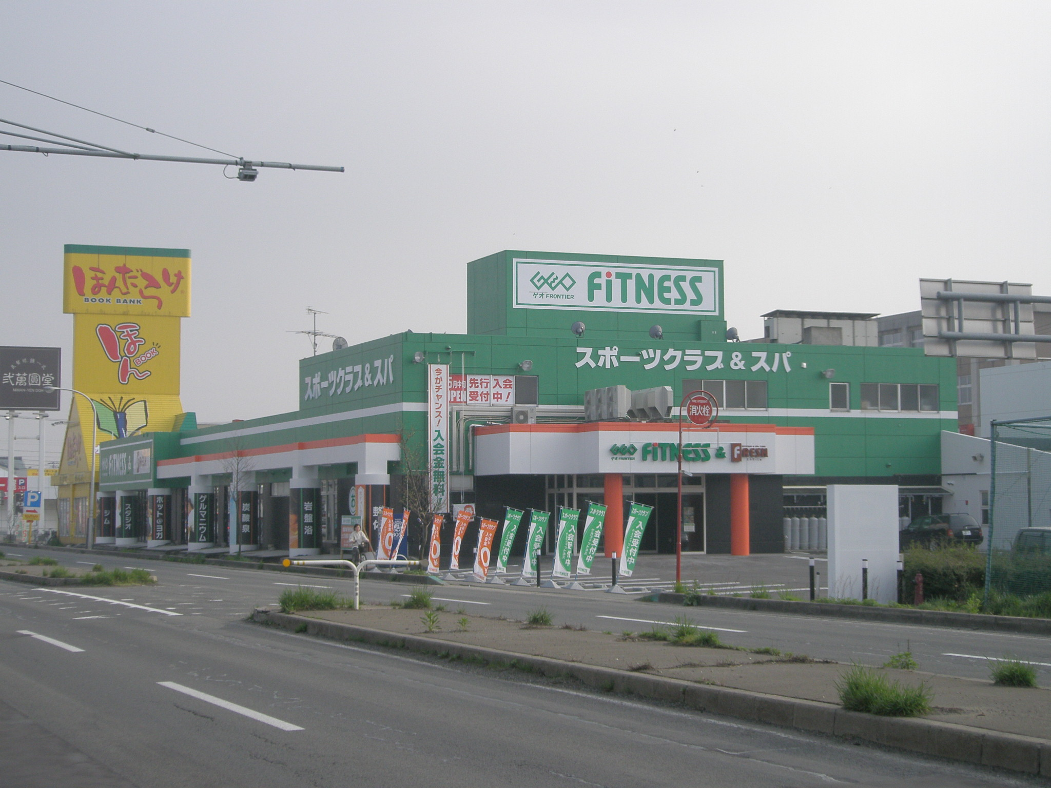 ゲオフィットネス秋田広面店（現・SDフィットネス秋田広面店）。かつてのいとく広面店の建物を改装したものである。